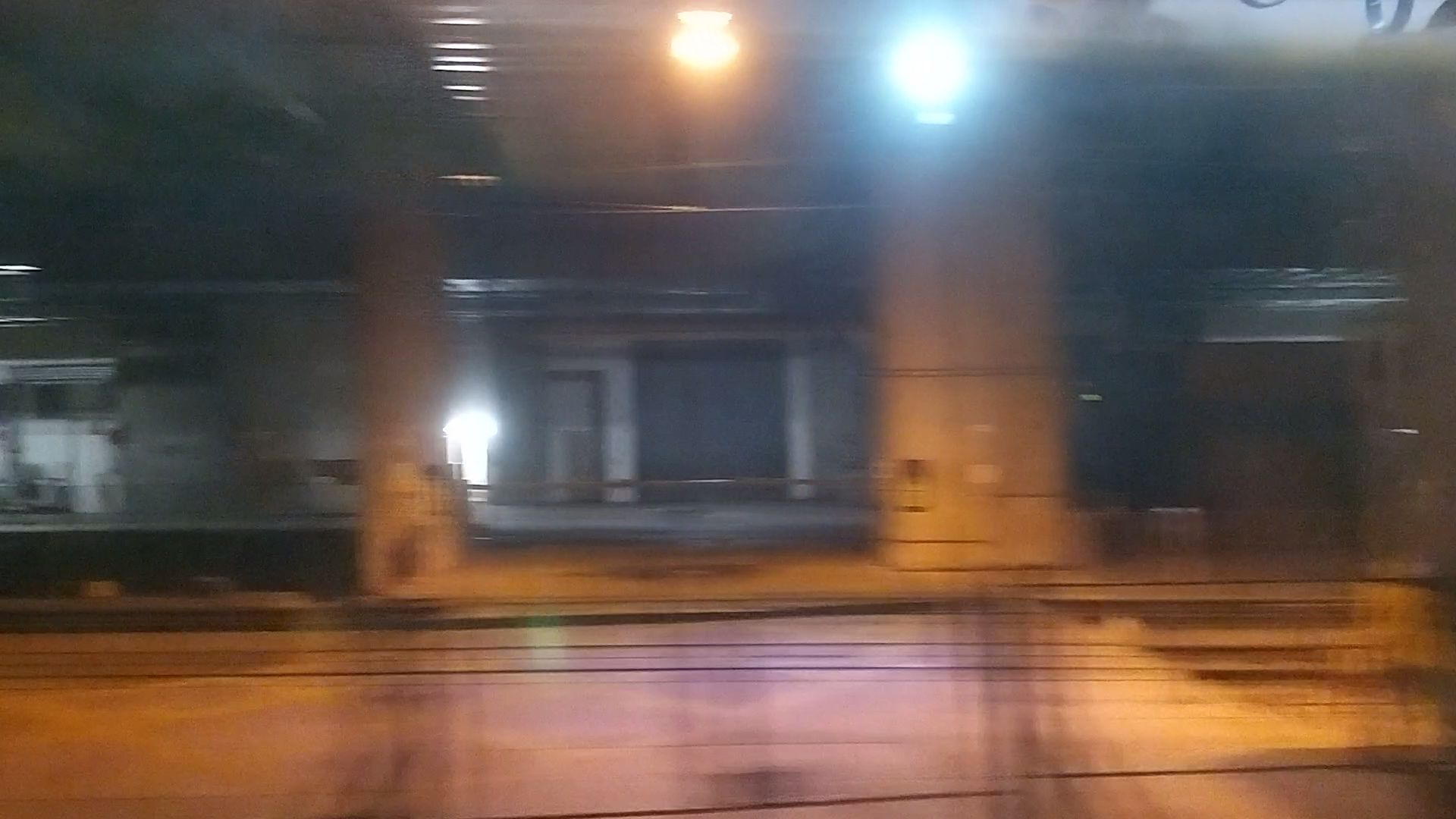 鄰近定修工場的道口